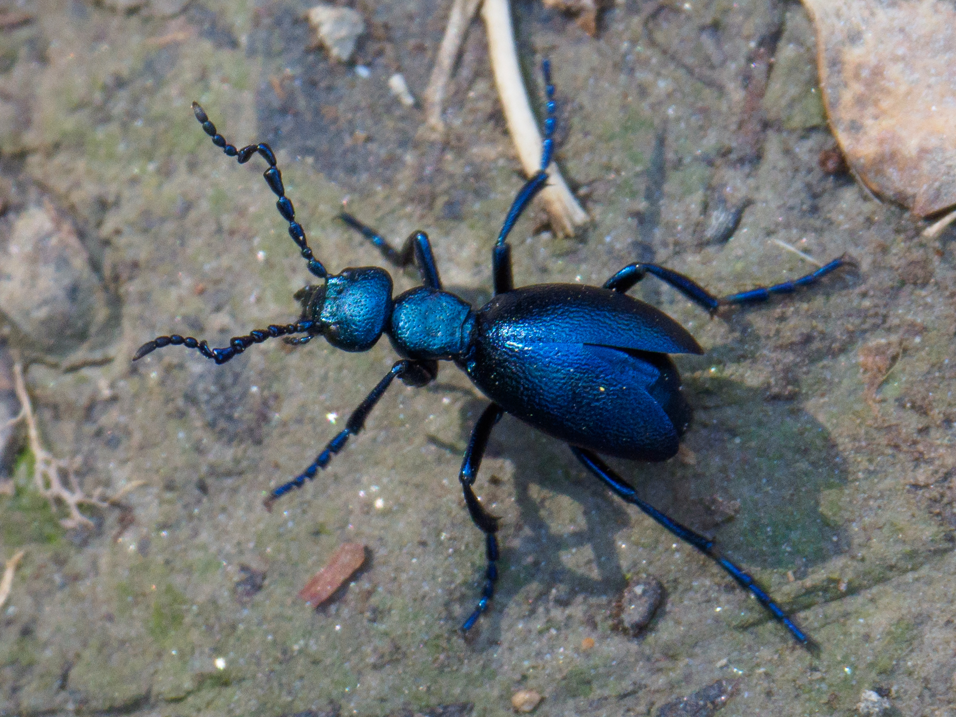 Violetter Ölkäfer ♂ ( Meloe violaceus ♂). Die geknickten Fühler sind gut erkennbar.